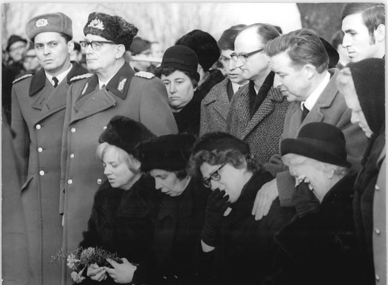 ADN-ZB Schaar-22.1.72-ill-Krs. Eisleben: Beisetzung des NVA-Leutnants Lutz Meier- Trauer und Schmerz kennzeichnen die Gesichter der Angehörigen des Leutnants Lutz Meier, der im Alter von 23 Jahren während der Ausübung seines Dienstes zum Schutz der Staatsgrenze ermordet wurde. Am 22.1.72 wurde der postum mit der Verdienstmedaille der NVA in Gold ausgezeichnete Offiezier in seinem Geburtsort Ahlsdorf, Krs. Eisleben, beigesetzt. v.l.: Chef der Grenztruppen, Generalleutnant Erich Peter